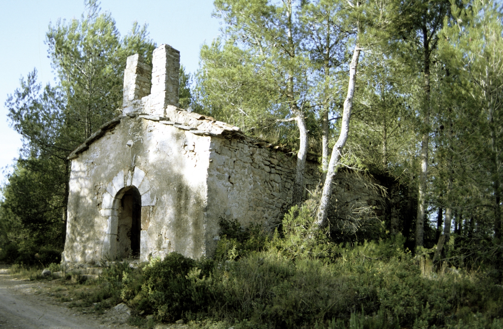 Selma. Capella de Sant Miquel del Pla de Manlleu. Fot. J. Fuguet, 1996.